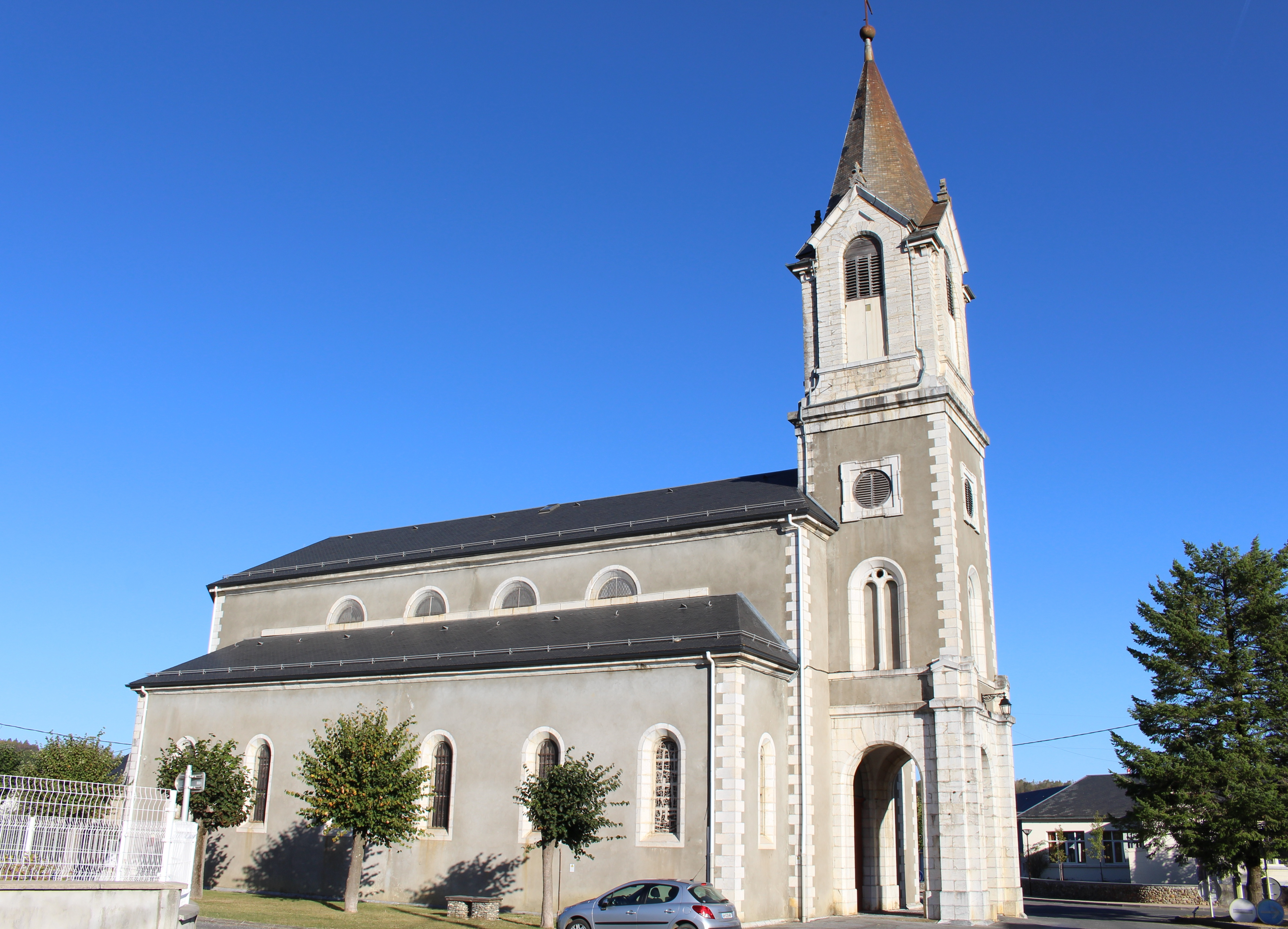 Église Saint-Jean-Baptiste de La Barthe-de-Neste (Hautes-Pyrénées)